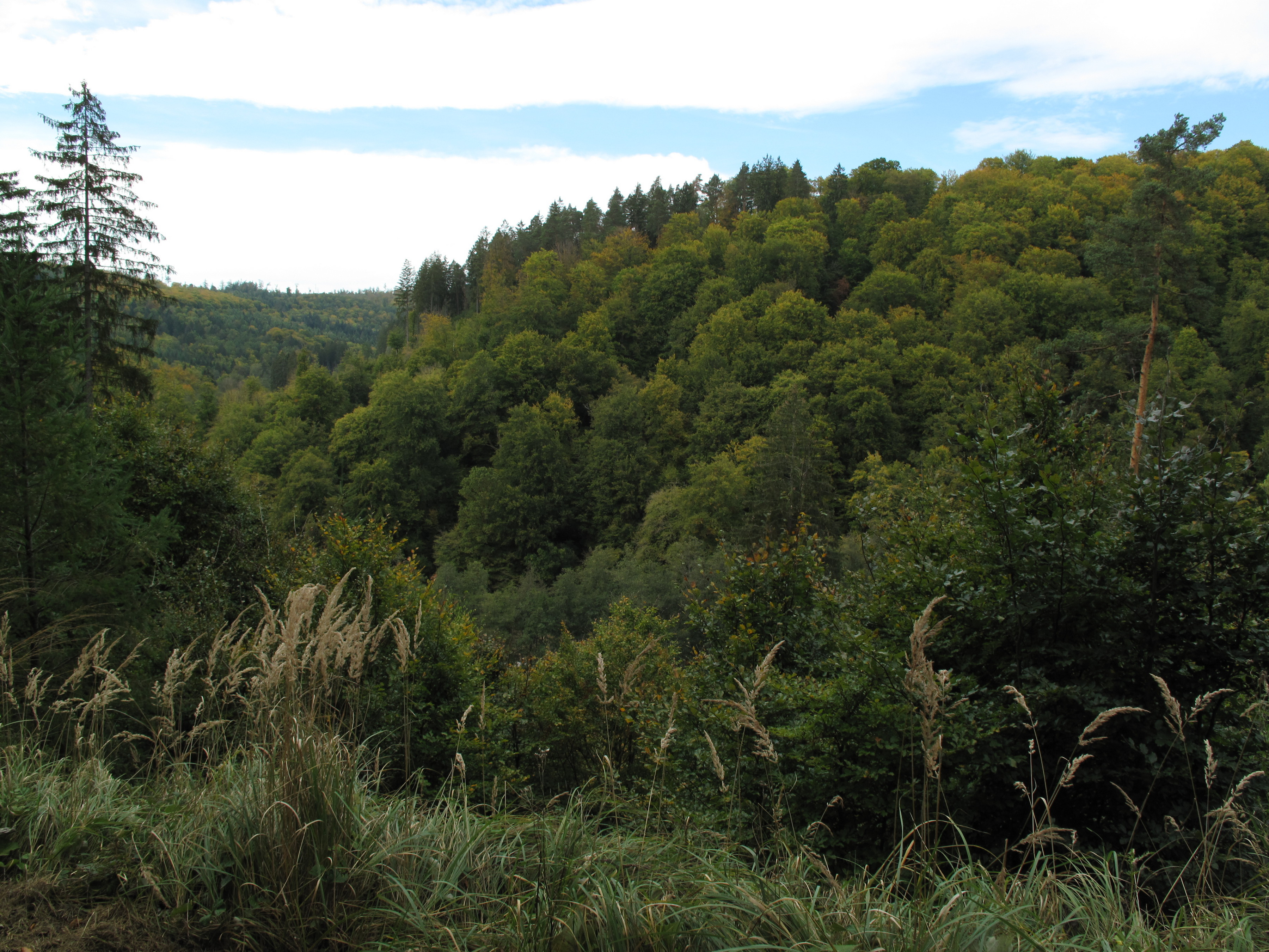 Blick zum Bromberg im Schönbuch.